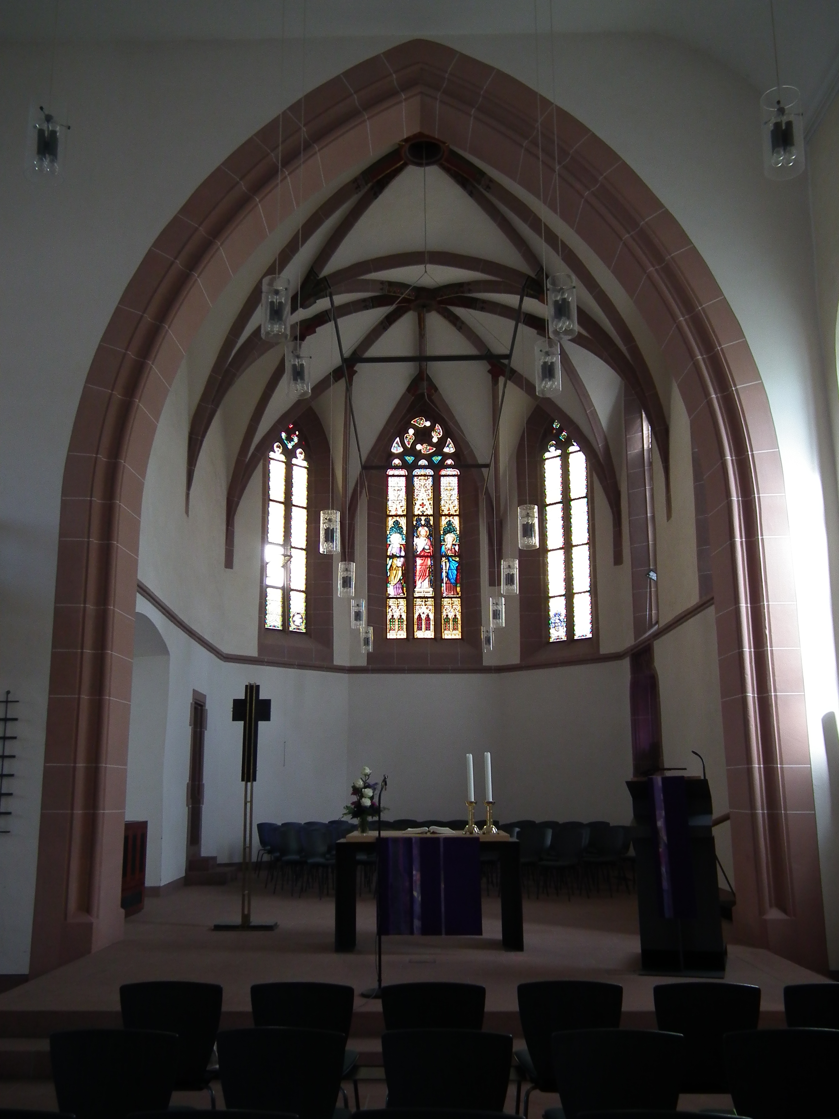 Chorraum der evangelischen Stadtkirche in Wiesloch (Baden-Württemberg, Deutschland)